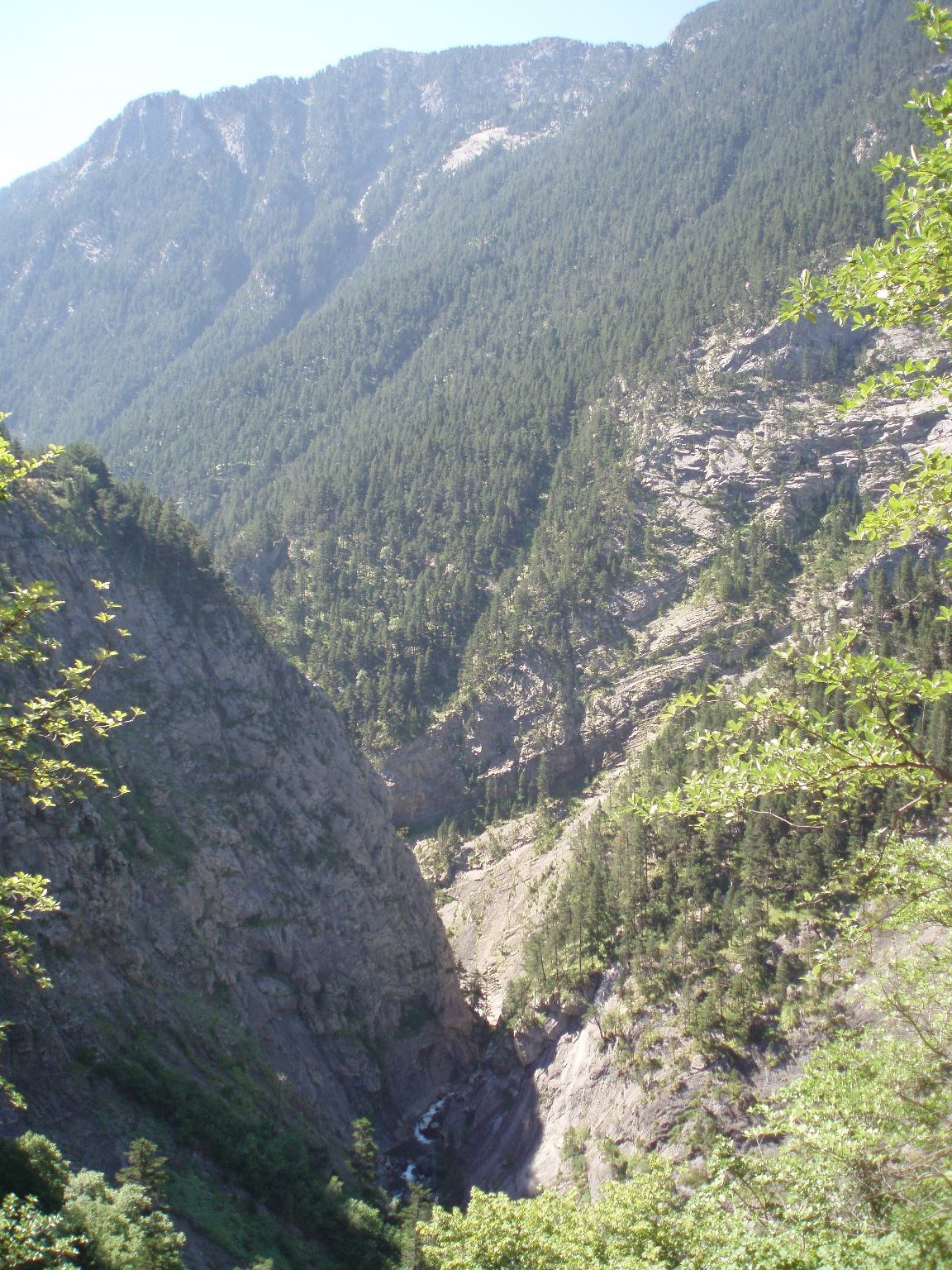 Garganta del valle de Vallibierna (Pirineos, España).